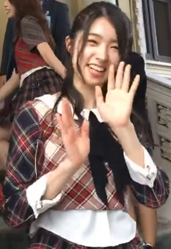 AKB48のメンバー岩立 沙穂